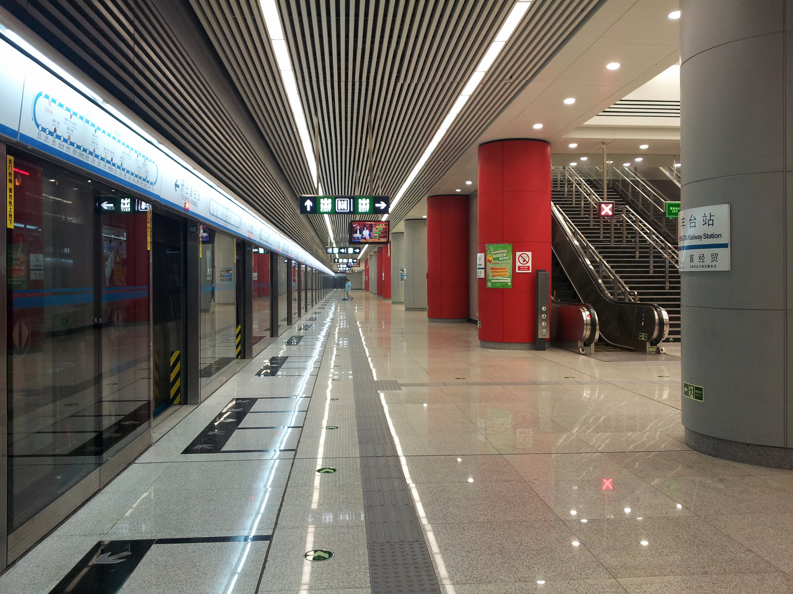 北京地铁10号线丰台站站台